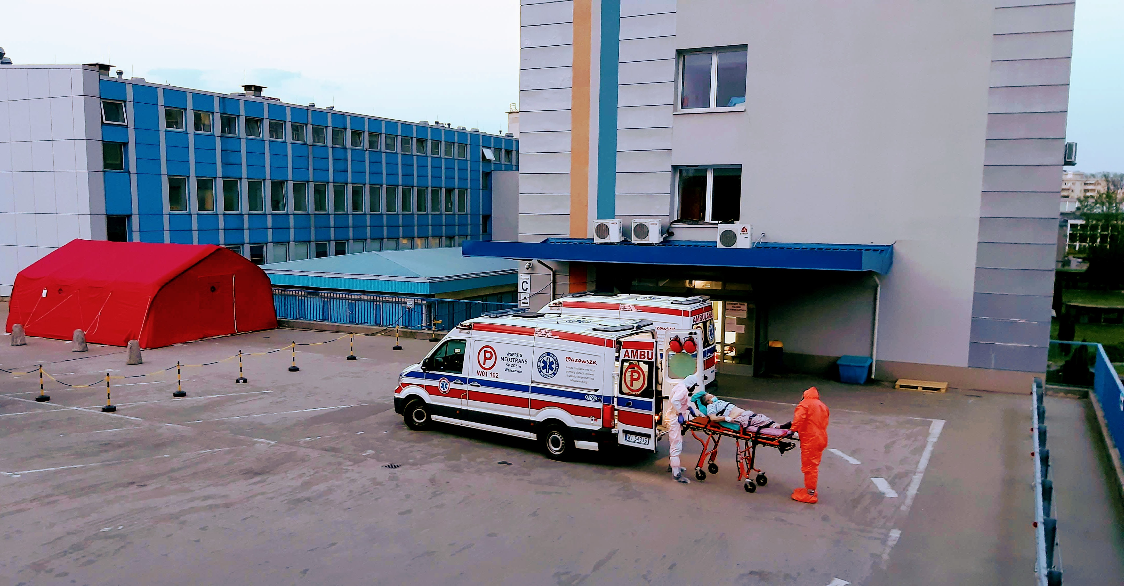 Przyjecie pacjenta w szpitalu Bródnowskim w czasie pandemii COVID-19 w 2020 roku